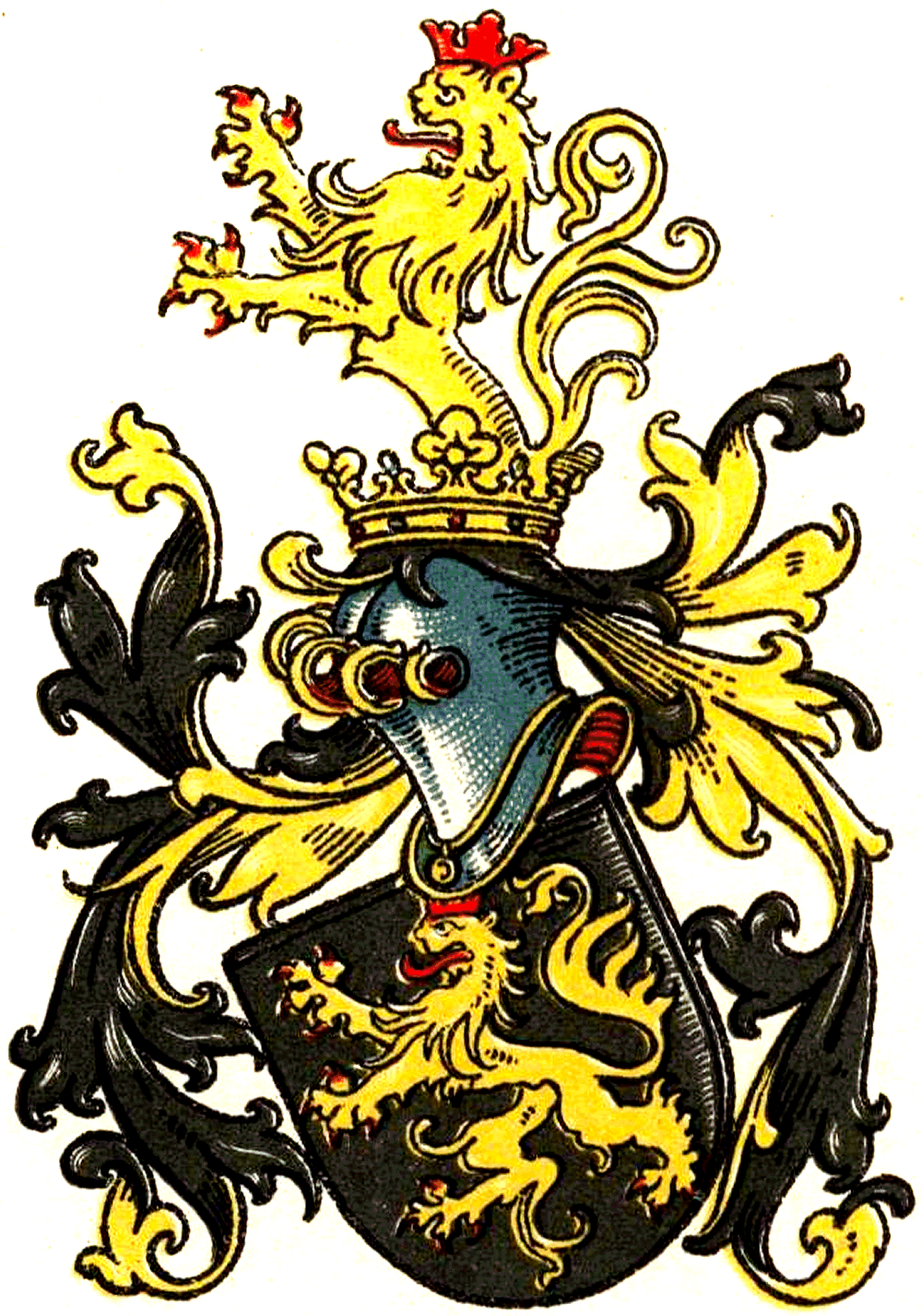 Wappen der Schenk von Nydeggen